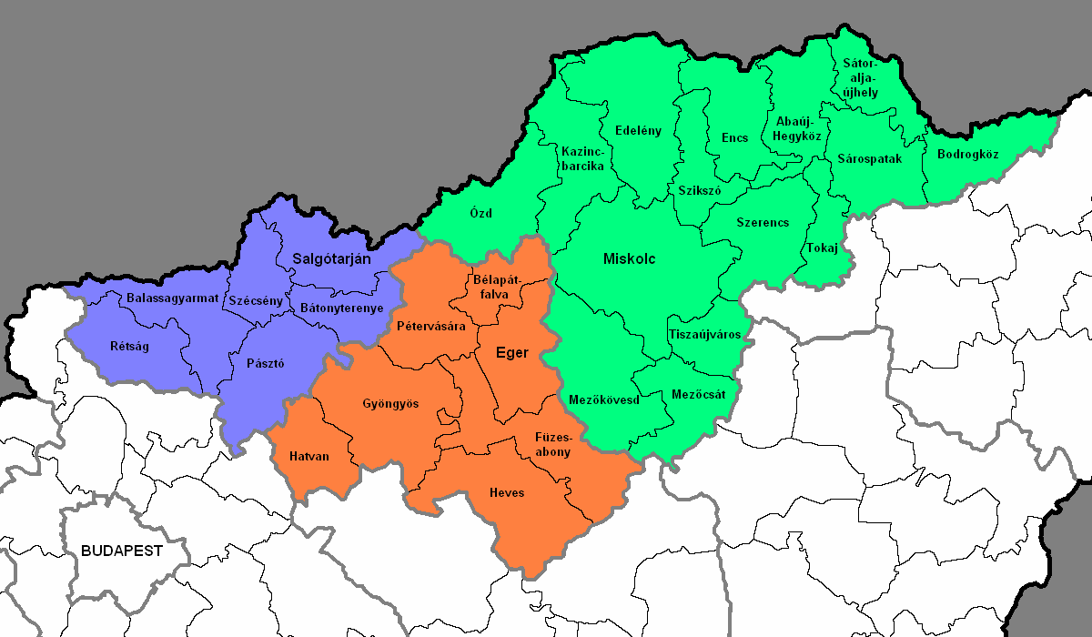 Nordungarn mit seinen Komitaten und Kleingebieten